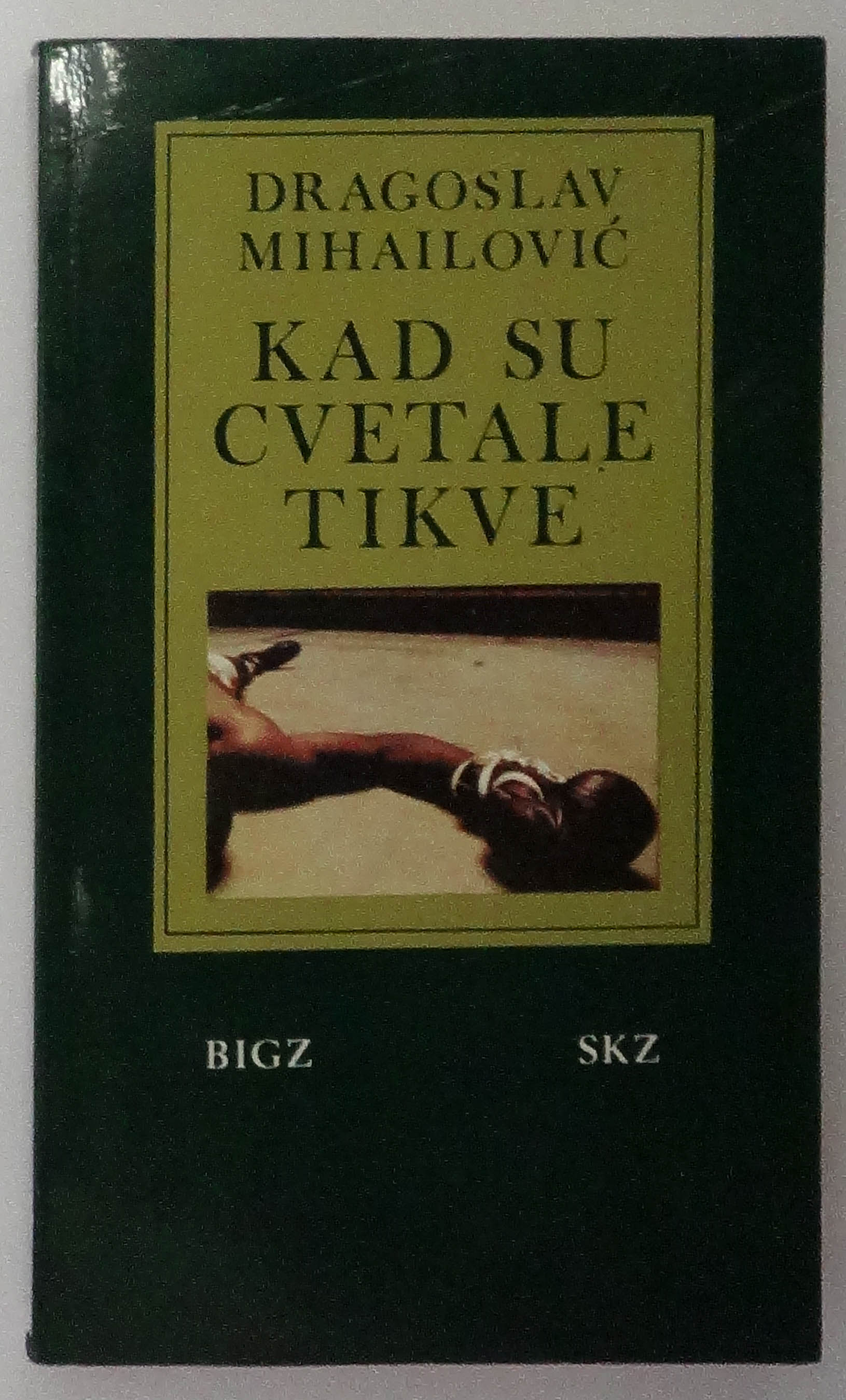 Корицата на „Кога цветаа тиквите“, БИГЗ и СКЗ, Белград, 1983.